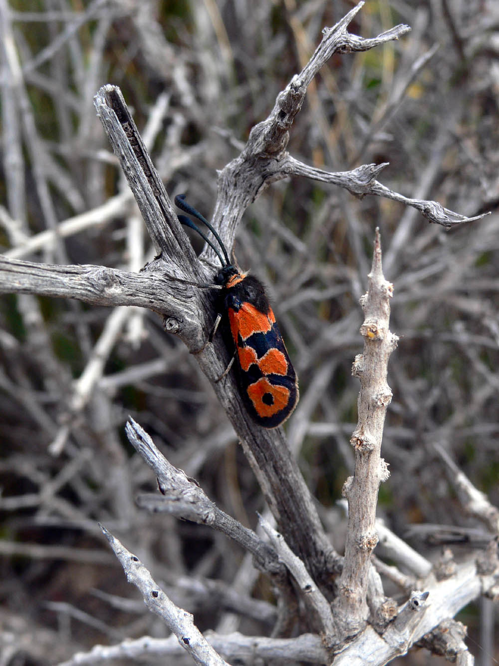 Zygaena fausta en La Azohía. Parque natural de la Sierra de la Muela en Cartagena (Spain)